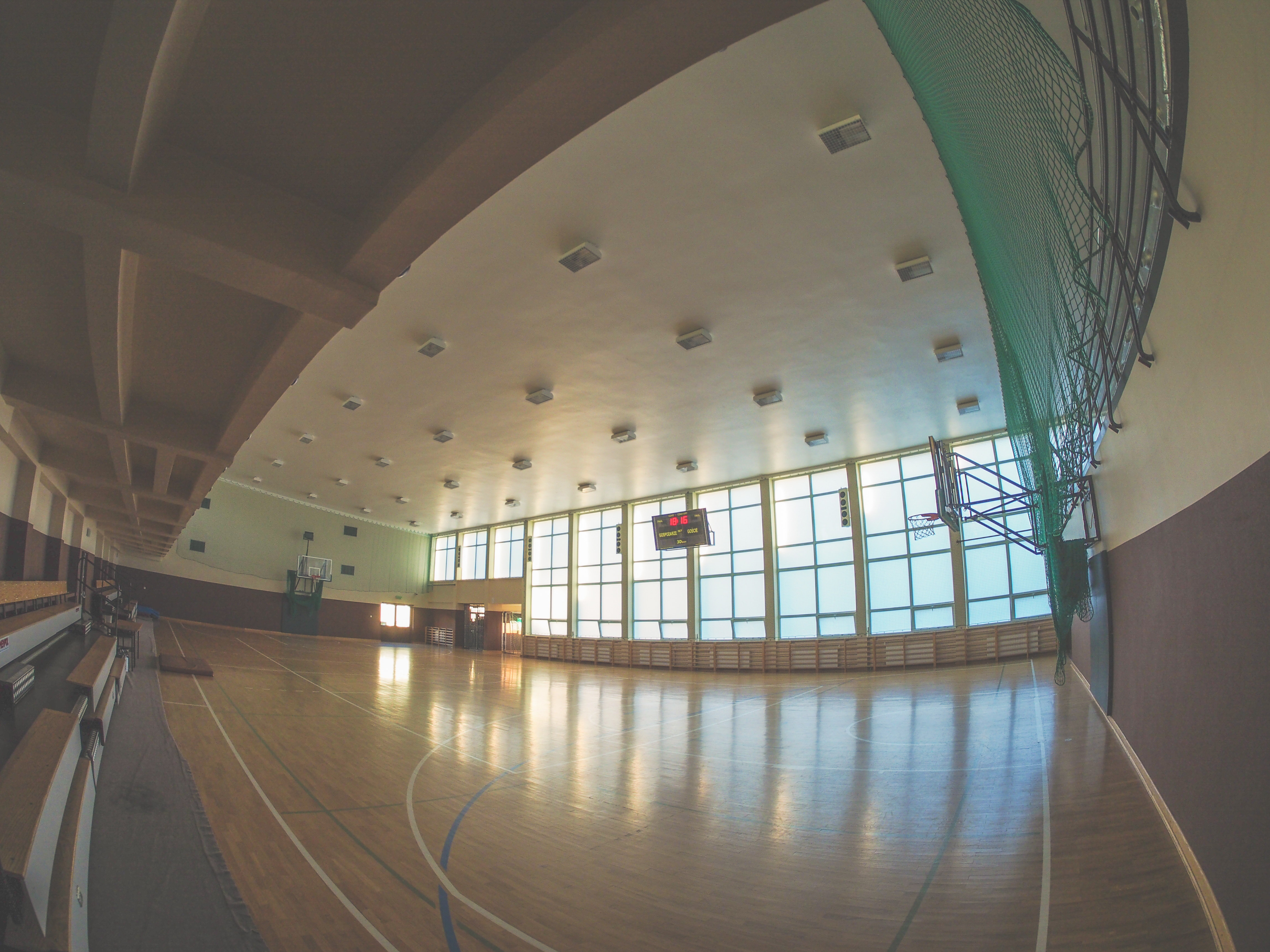 Jedna z sal sportowych w Centrum Kultury Fizycznej UMCS